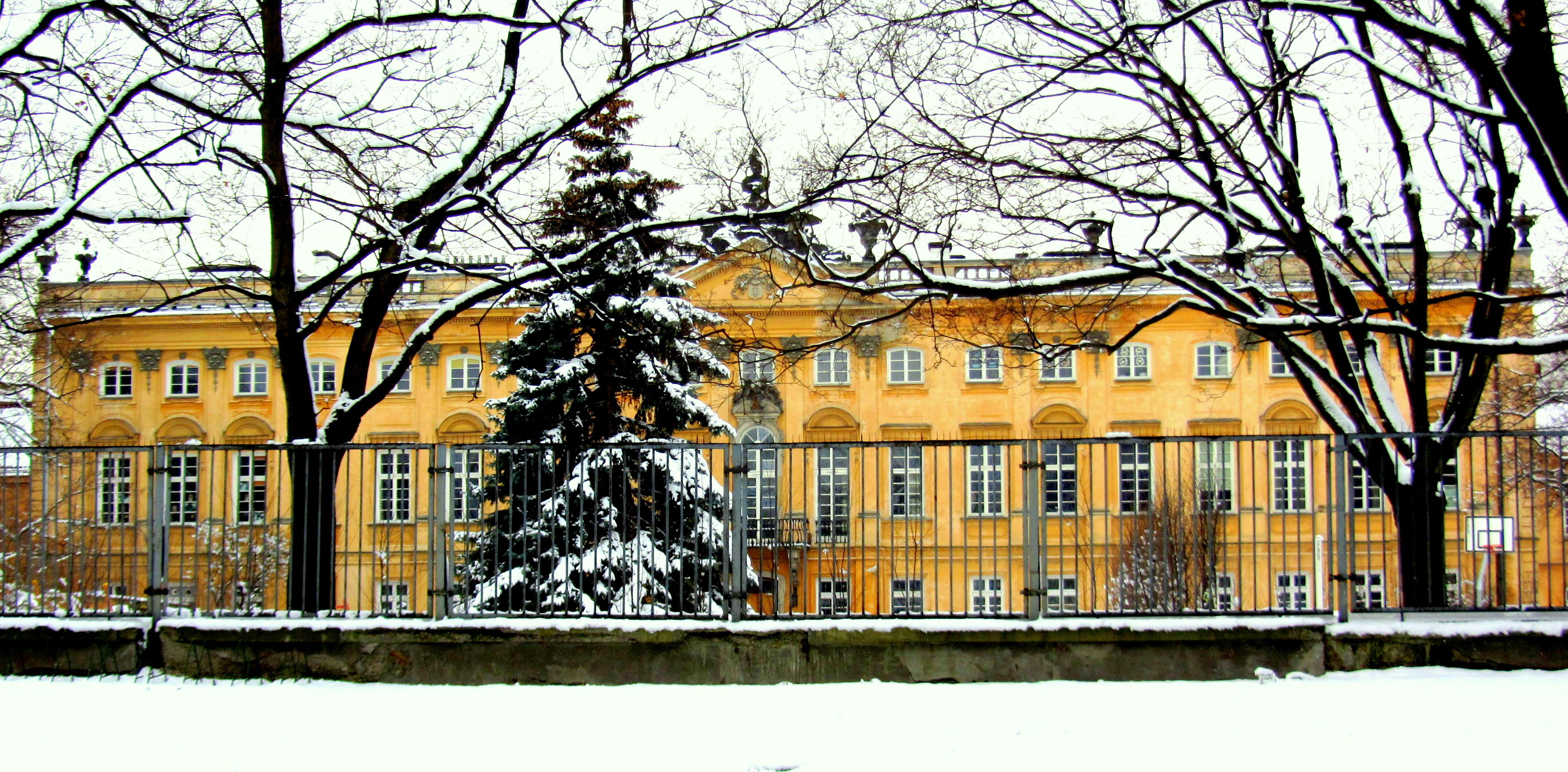 Pałac Sapiehów w Warszawie od strony dawnego ogrodu z widokiem na Wisłę.